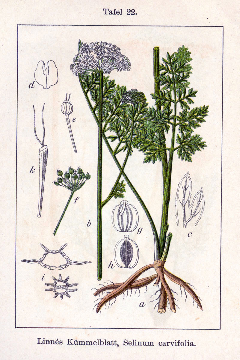 Selinum carvifolia (L.) L. Original Description Linnés Kümmelblatt, Selinum carvifolia